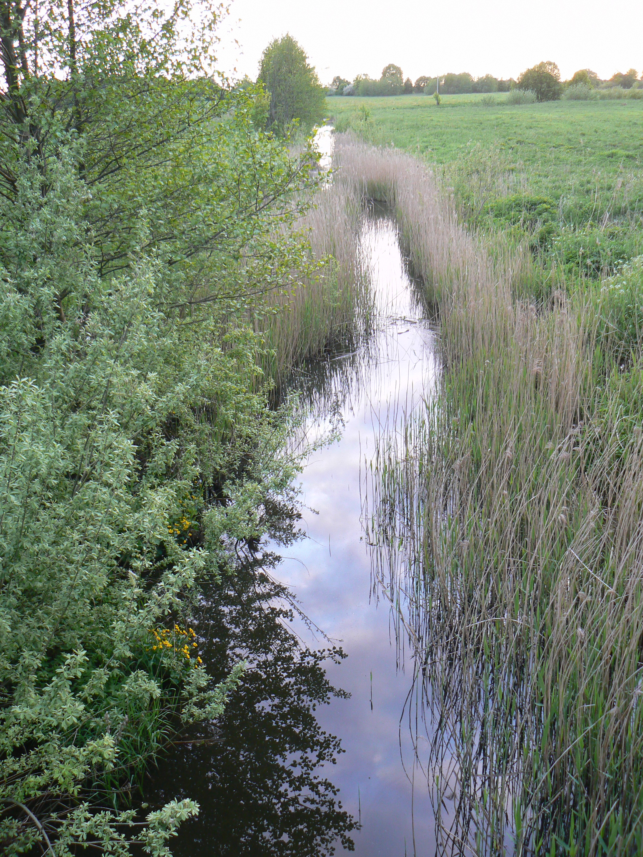 Kisupė na sever od vsi Rokai